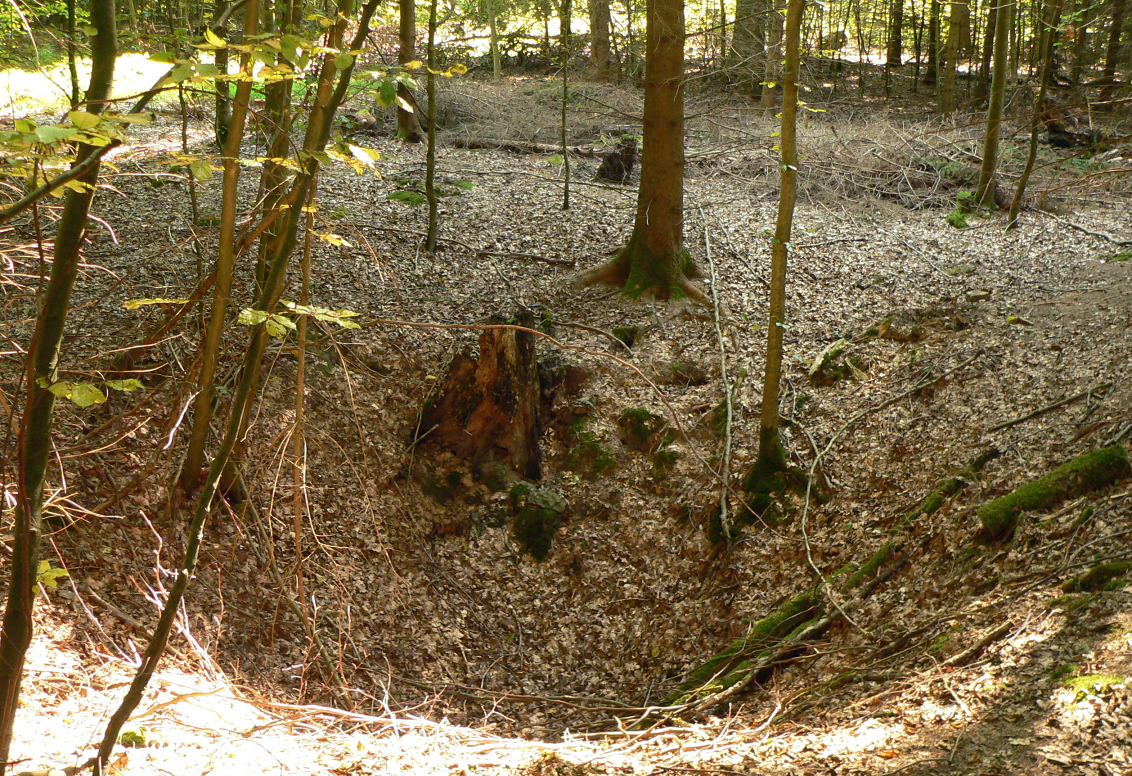 Bodenvertiefung nahe der Wall-Grabenanlage in der Wüstung Iseshusen